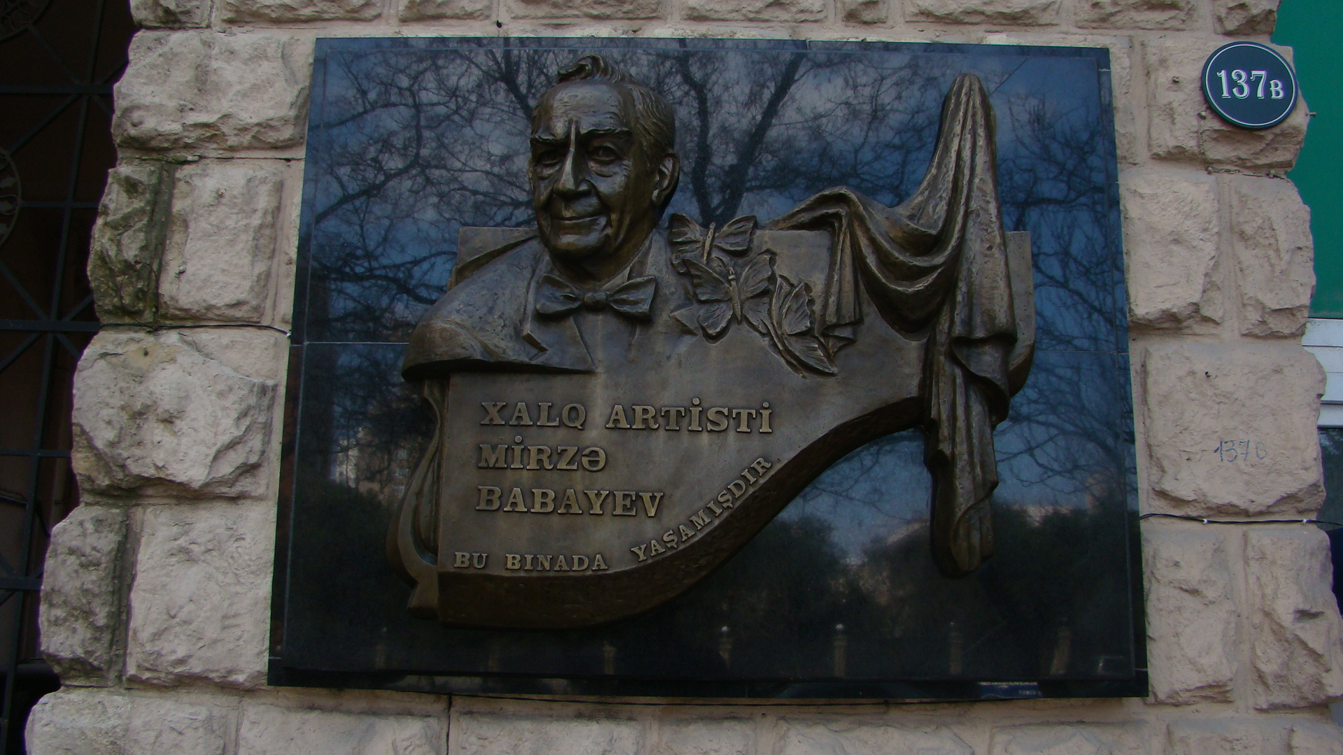 Səməd Vurğun küçəsində Mirzə Babayevin barelyefi